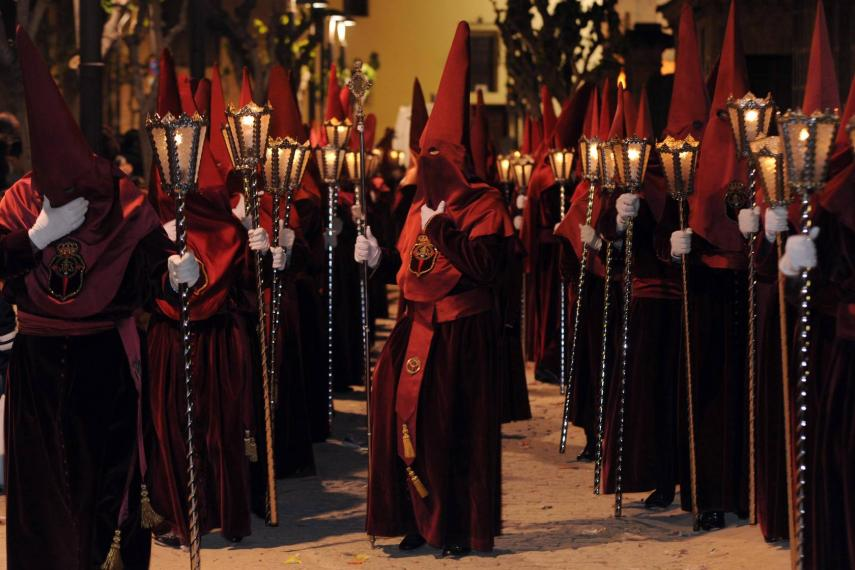 Mayordomo y nazarenos del Perdón